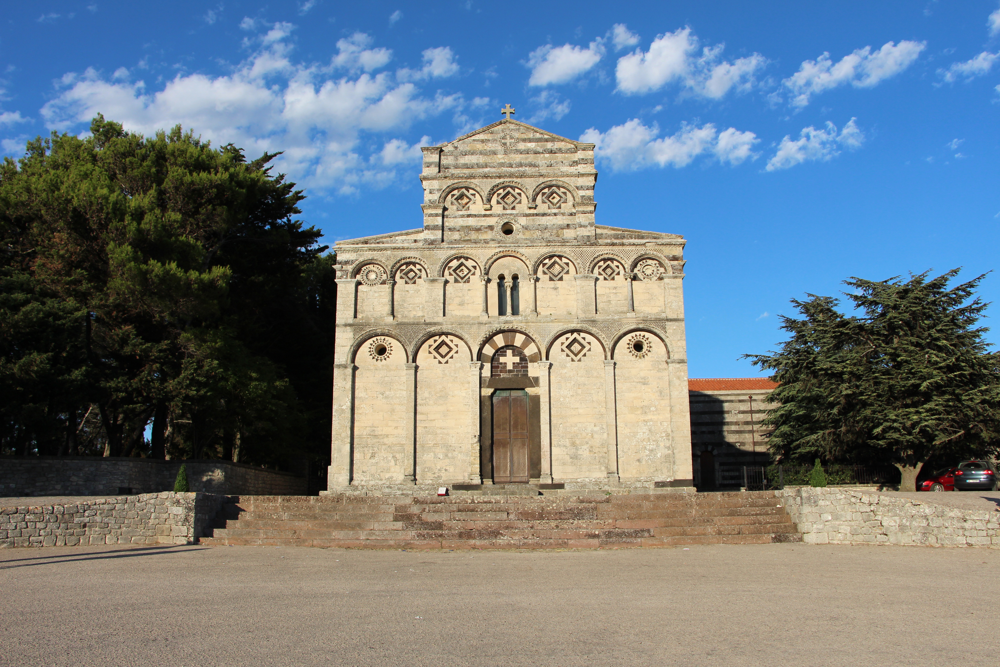 Chiesa di San Pietro di Sorres (Borutta)